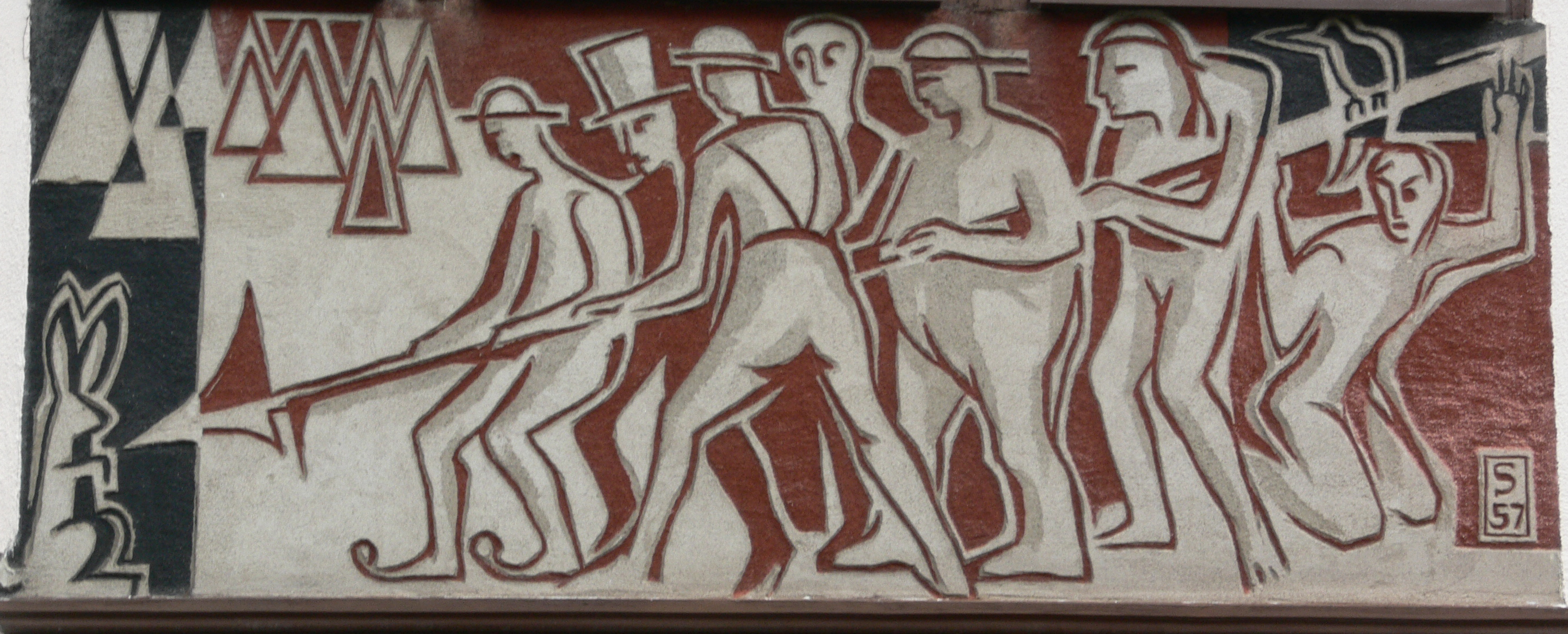 Bad Wildbad, Landkreis Calw, Baden-Württemberg: Wandbild "Sieben Schwaben" (signiert "S. 57"), 1957